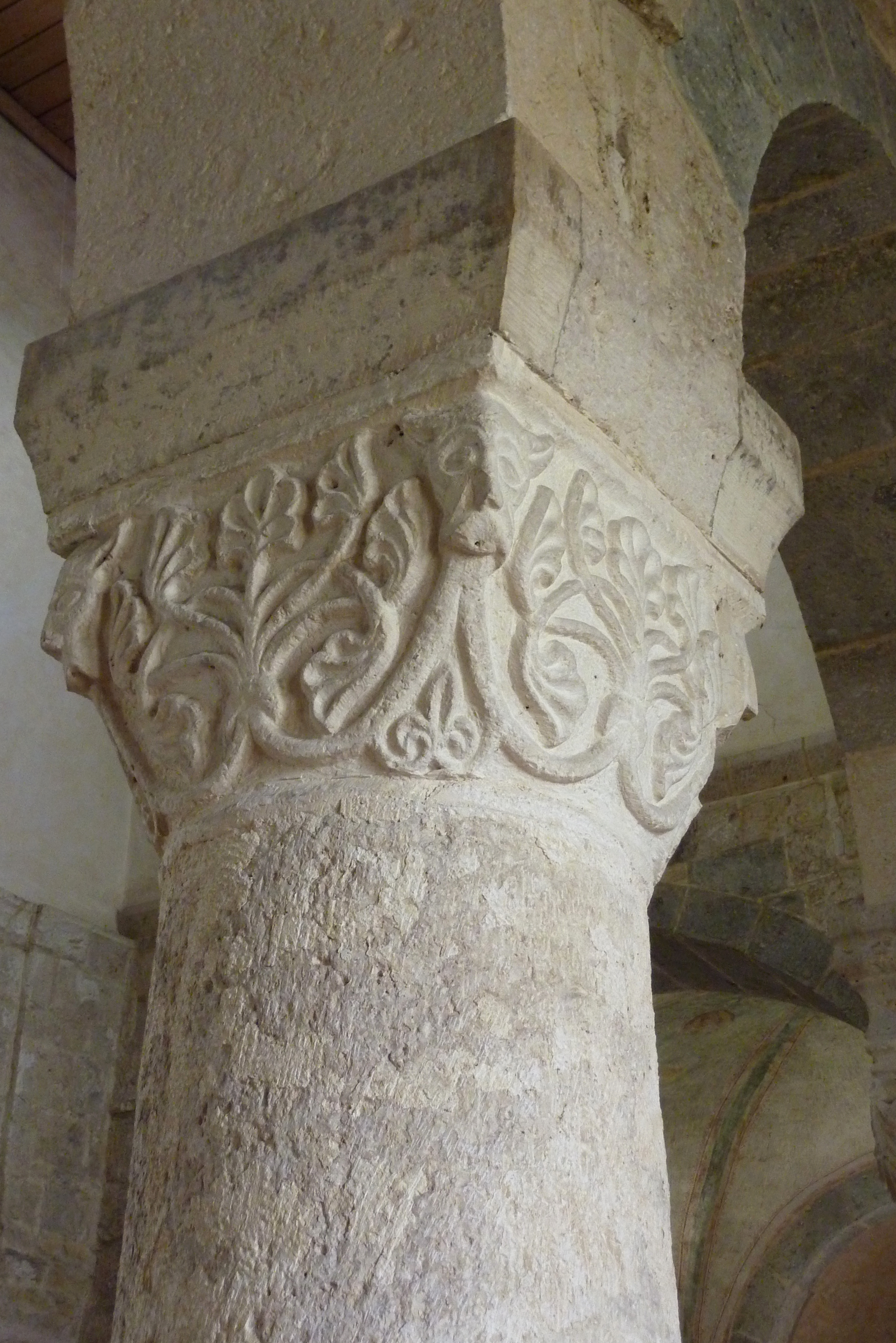 Evangelische Kirche St. Gallus in Brenz an der Brenz, einem Ortsteil von Sontheim an der Brenz (Baden-Württemberg), Kapitell